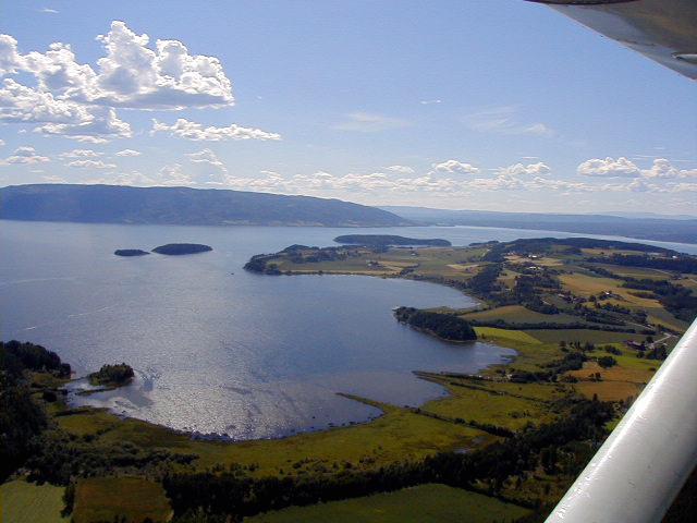 Sælabonn, Tyrifjordplatået og Røysetangen/Bønsnes i Hole, mot Øst Modum og Vikersund, sett fra fly.